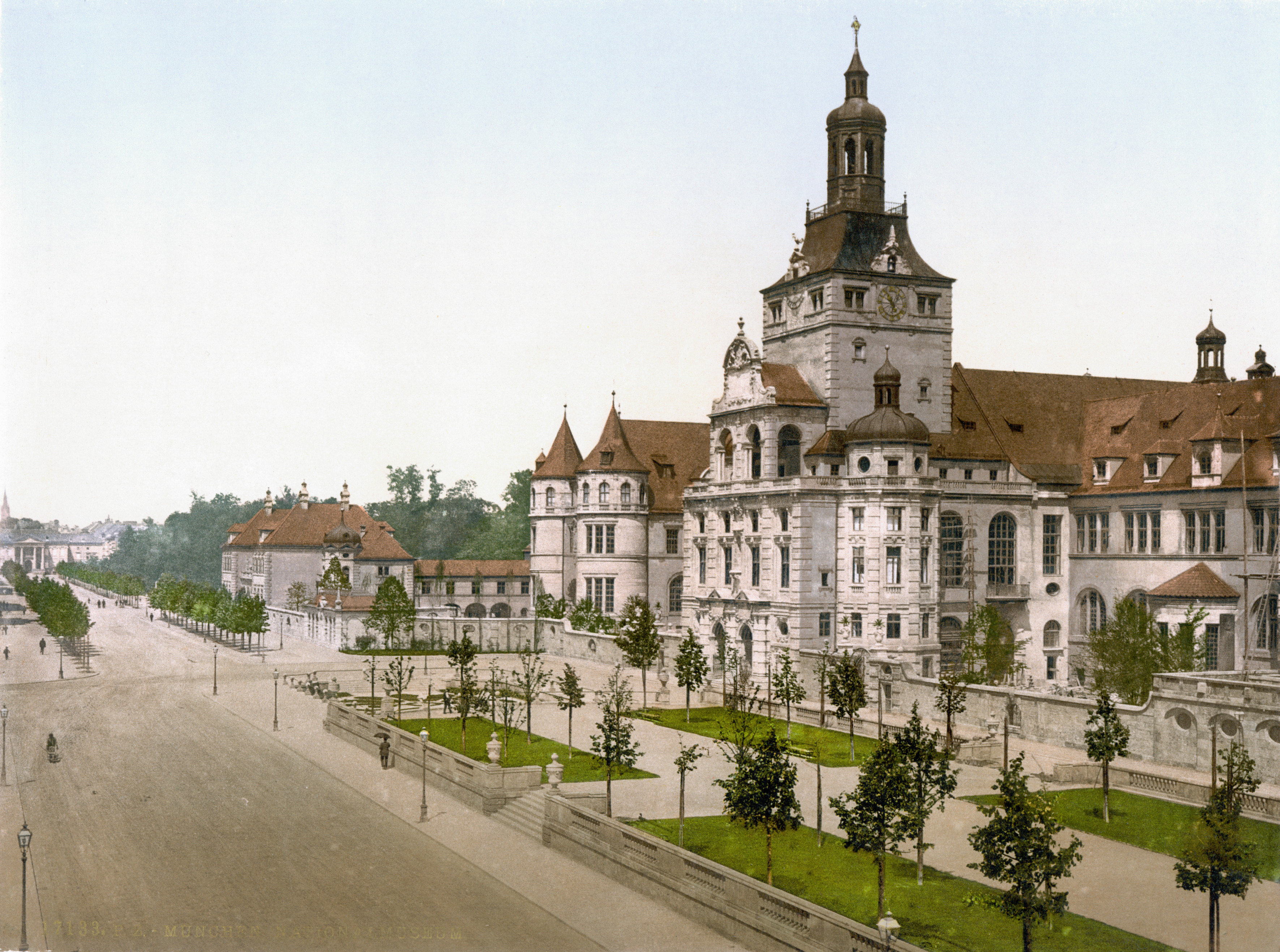 Bayerisches Nationalmuseum München